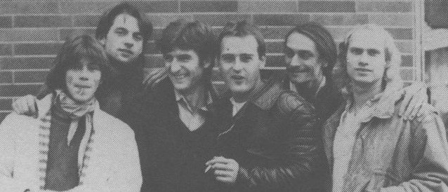 Rockband Schwoißfuaß 1983. Von links nach rechts: Martin Göring (Technik), Riedel Diegel (Mundharmonika), Michael Stoll (Bass), Alex Köberlein (Gesang), Eberhard Bronner (Schlagzeug), Didi Holzner (Gitarre)